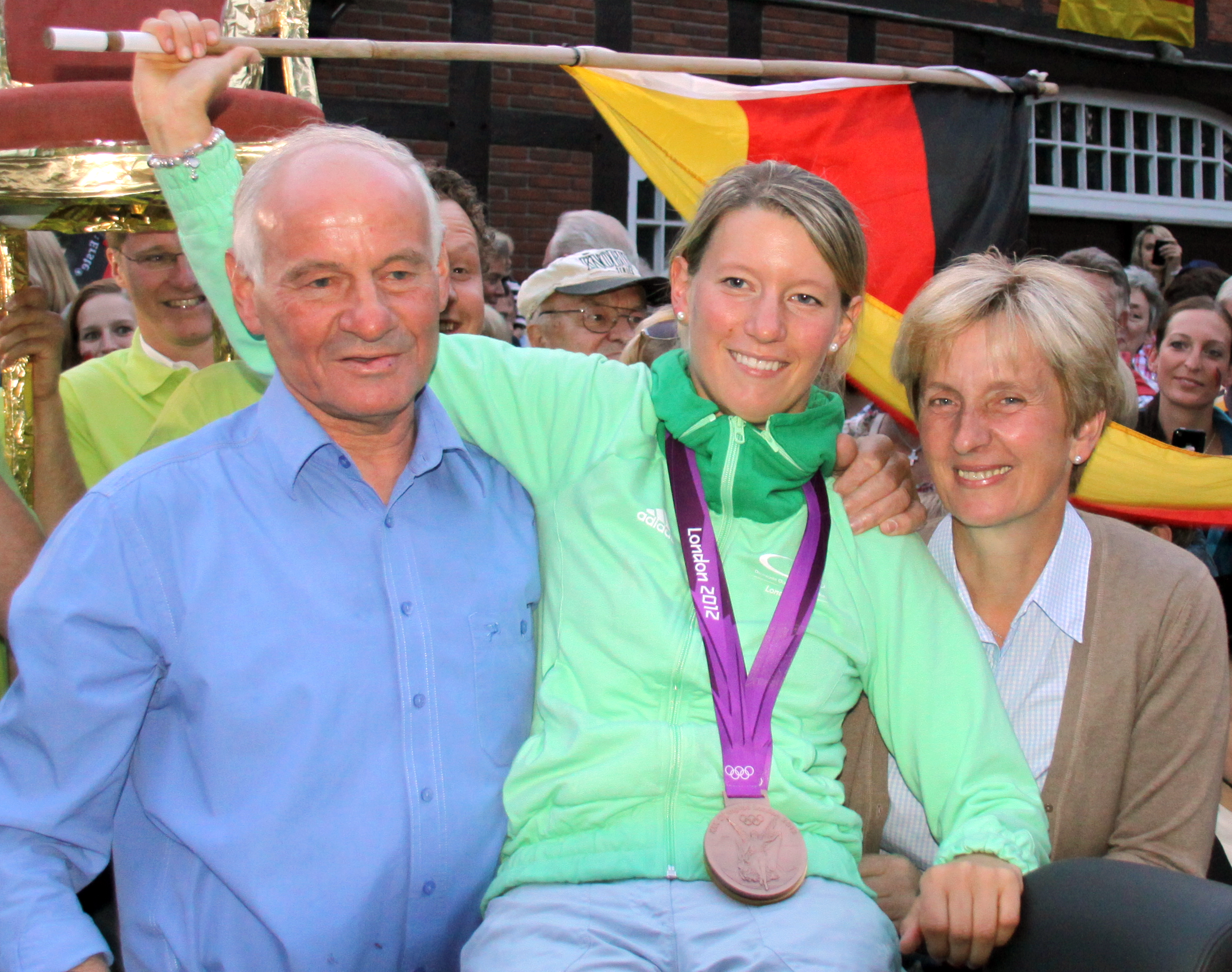 Sandra Auffarth bei ihrer Rückkehr nach Bergedorf.